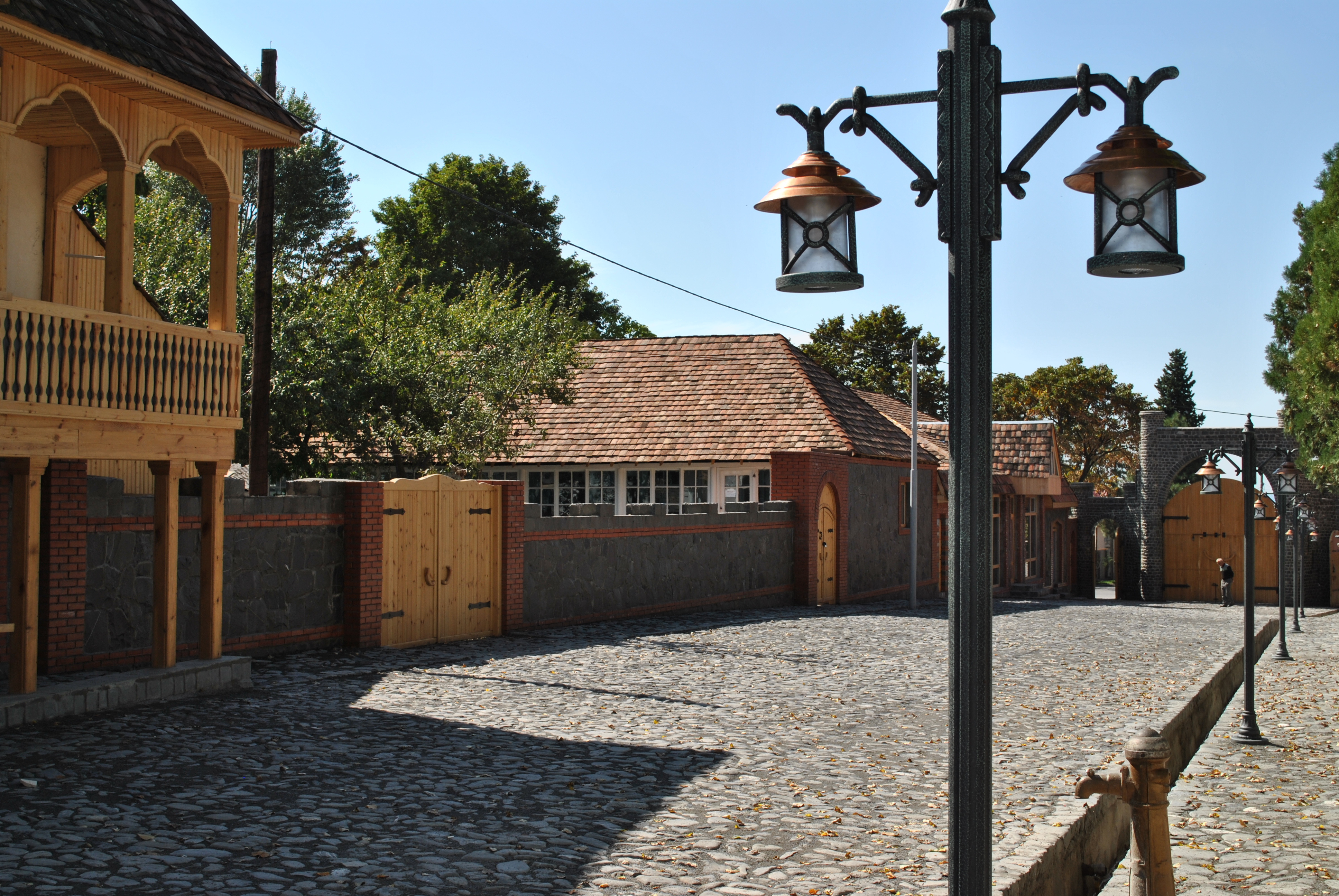 İçəri bazar küçəsi